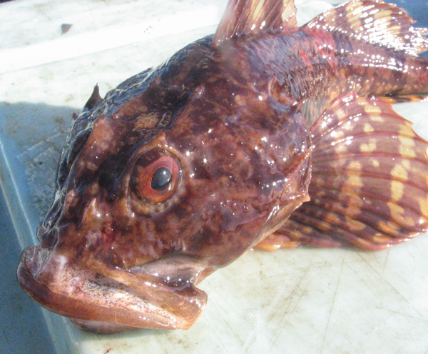 Chaboisseau fraîchement sorti de l'eau, sur un bâteau de pêche, aux Îles-de-la-Maldeleine, pendant l'automen 2006. Photo prise par Matthieu Godbout.